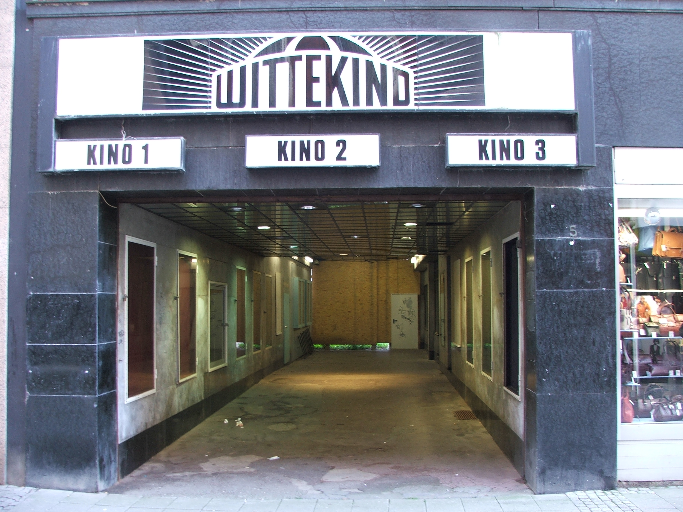 Fassade altes Wittekind Kino, Hoeckerstr. 5This is a photograph of an architectural monument.